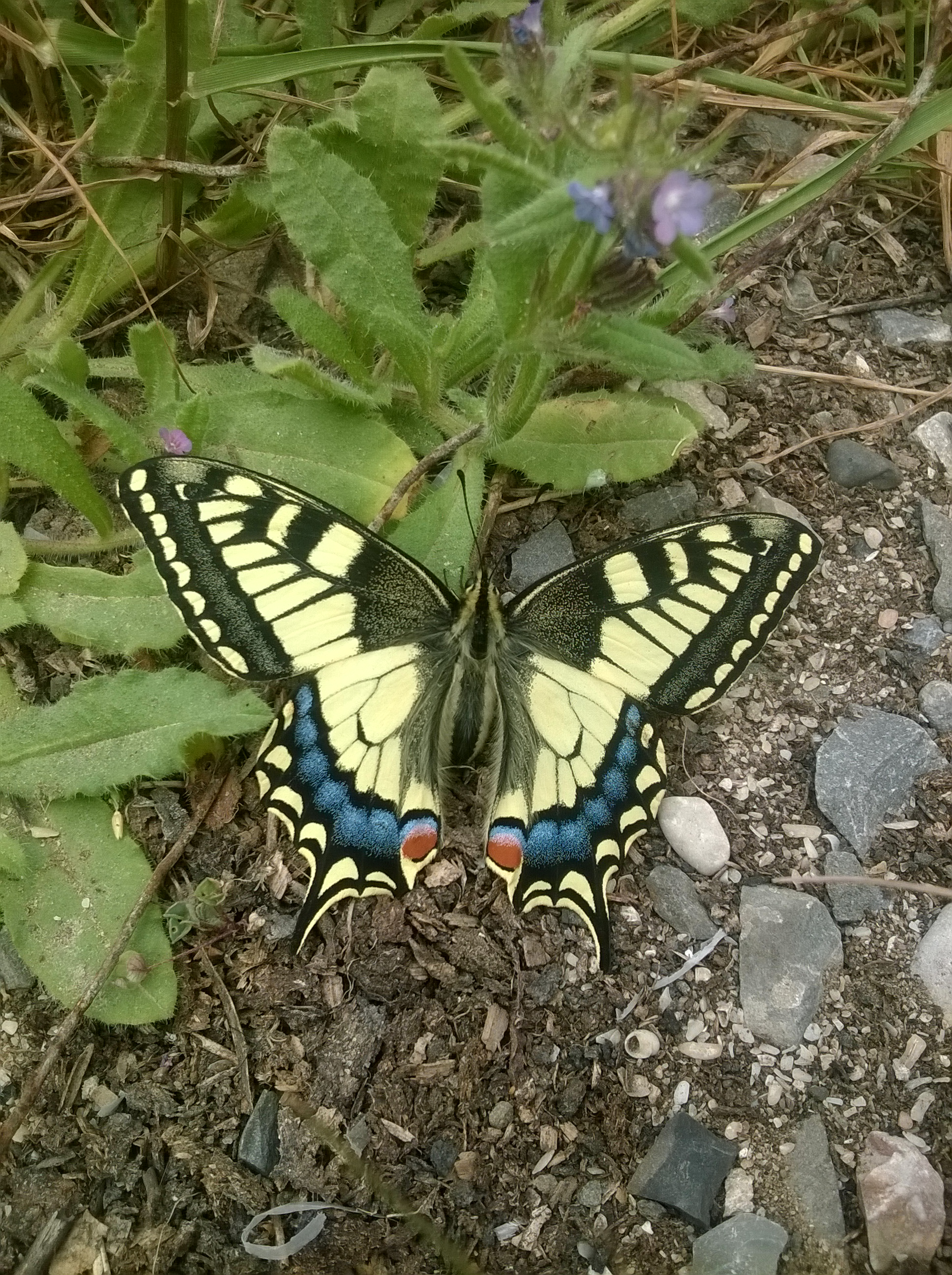 Maxaon (kəpənək)